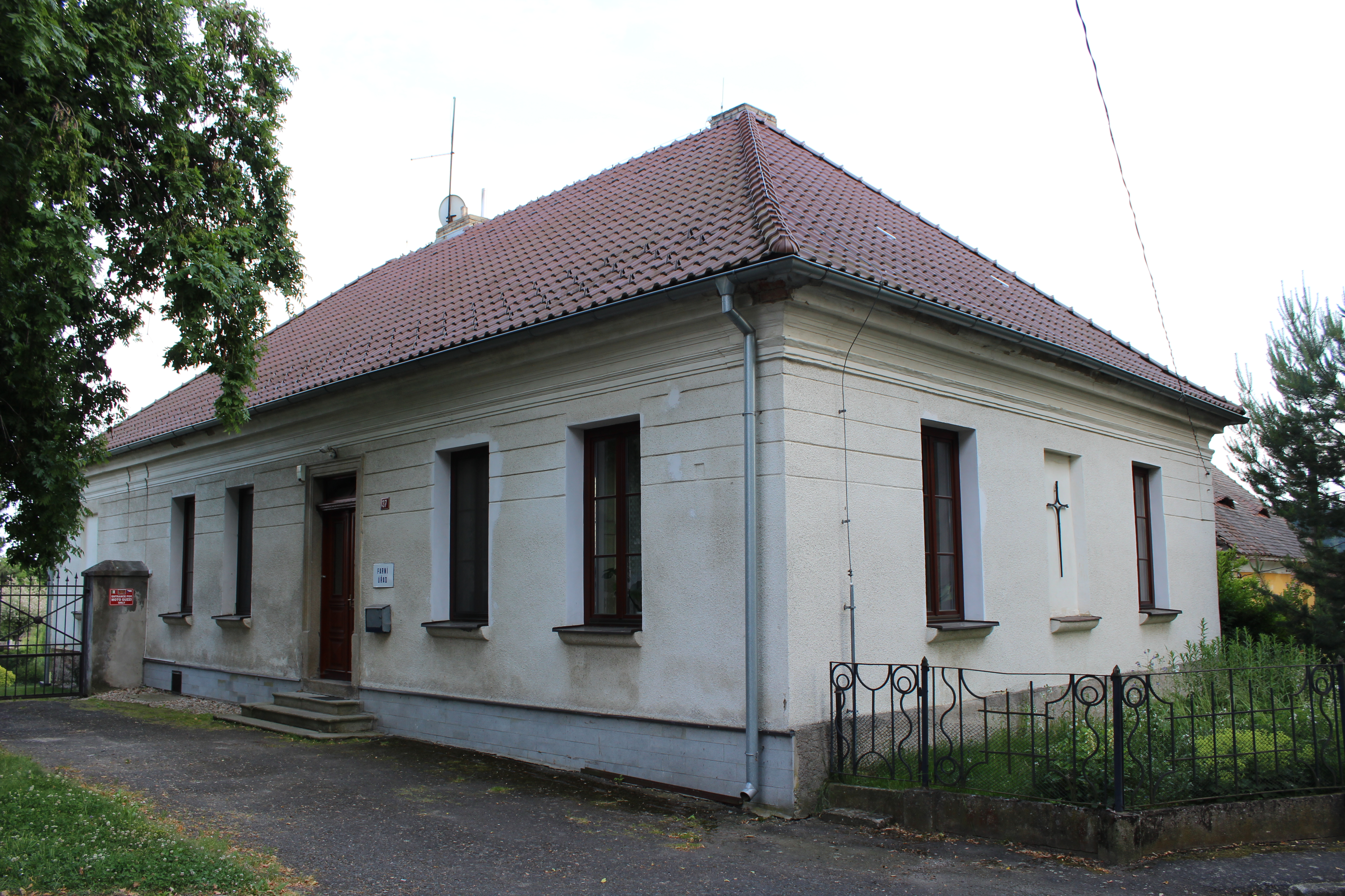 Fara v Keblově (dům číslo popisné 37).